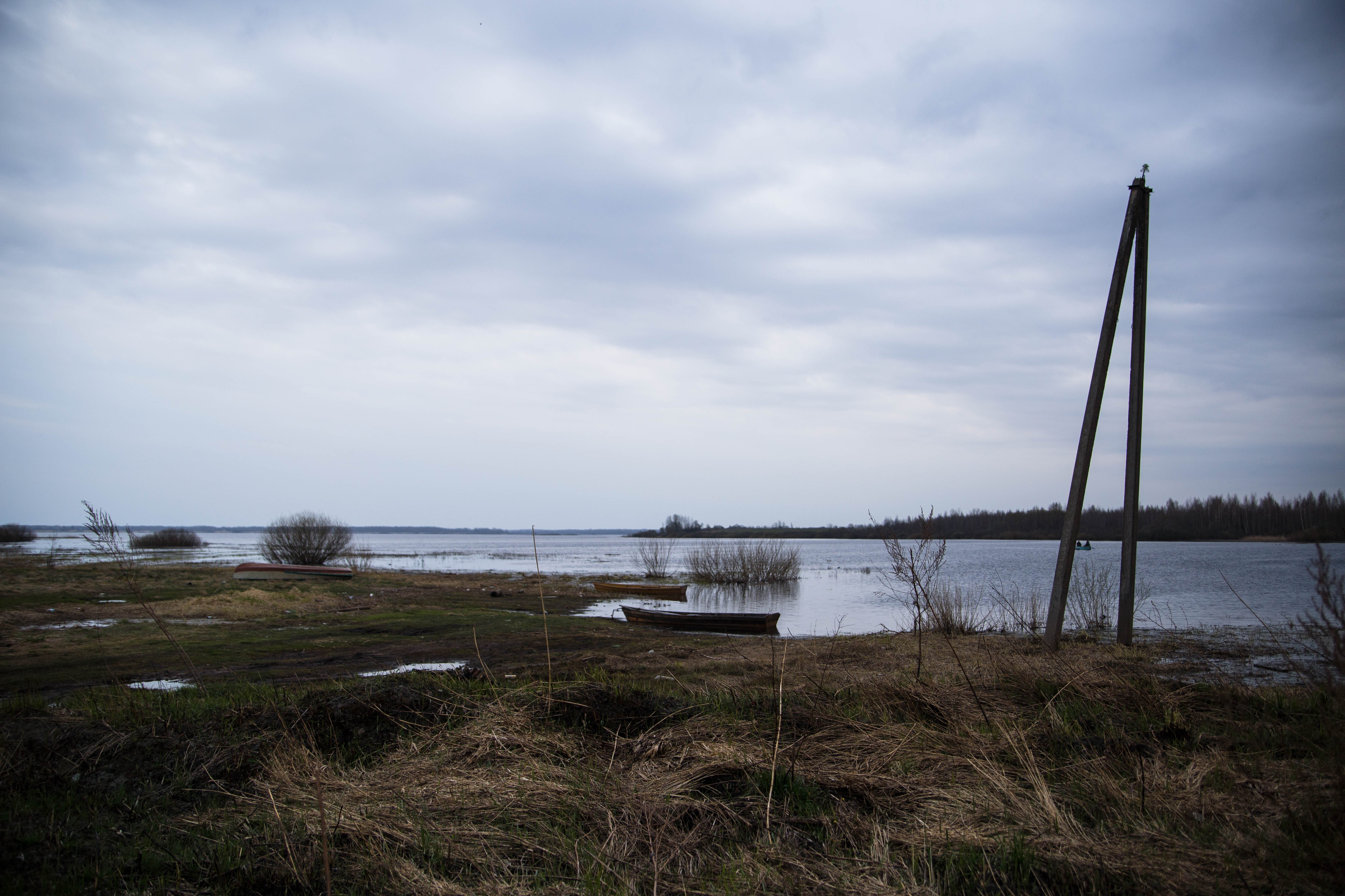 Озеро Усвятское: Усвятский район, Псковская область This image is related to the protected area of Russia number 6010377